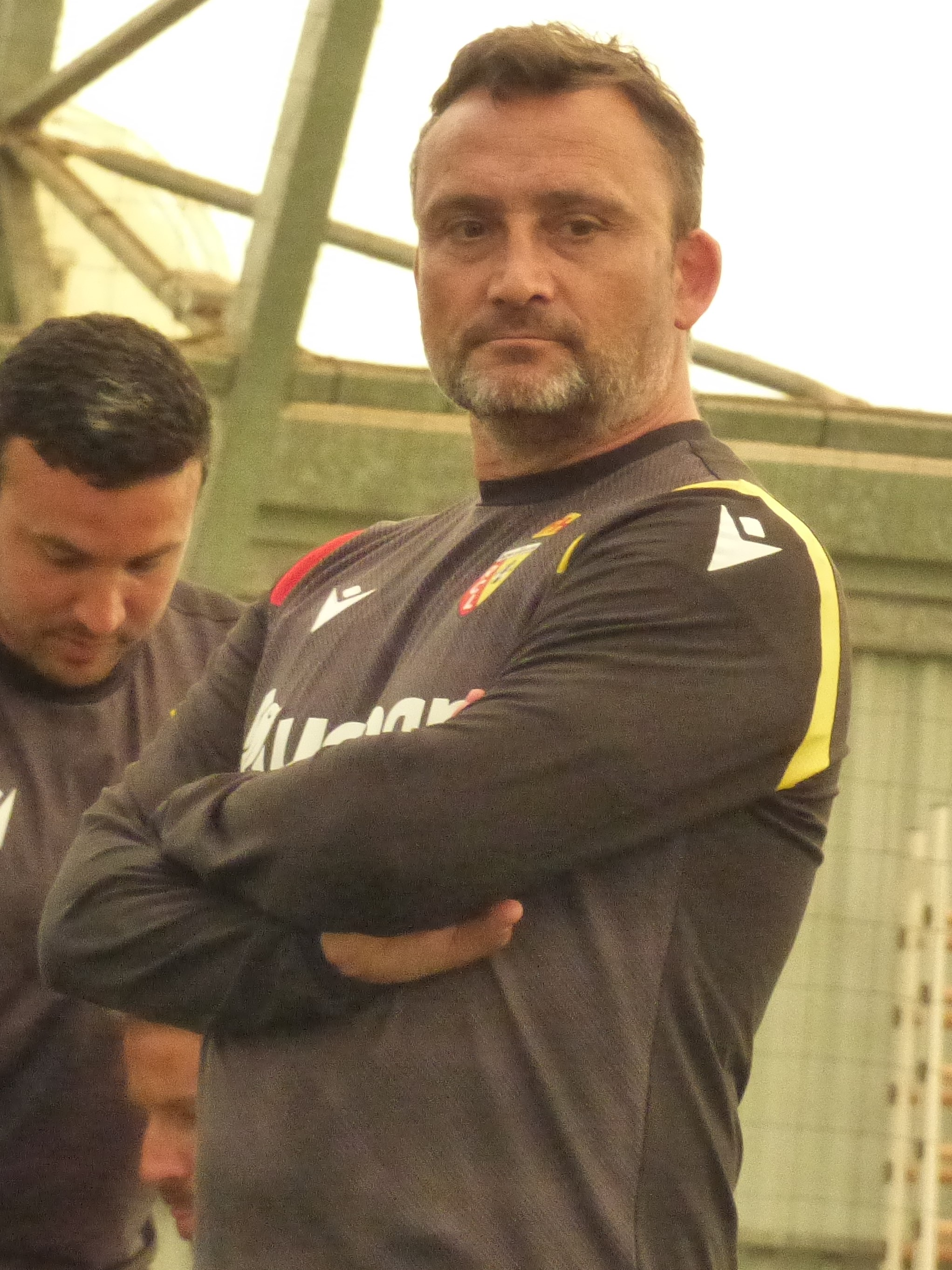 Franck Haise lors d'un entraînement à huis-clos du Racing Club de Lens, le 3 juillet 2020, au centre technique et sportif de La Gaillette.